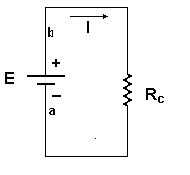 Circuito con generador de tensión constante. Este diagrama ha sido creado por PACO 19:14 7 oct, 2004 (CEST).